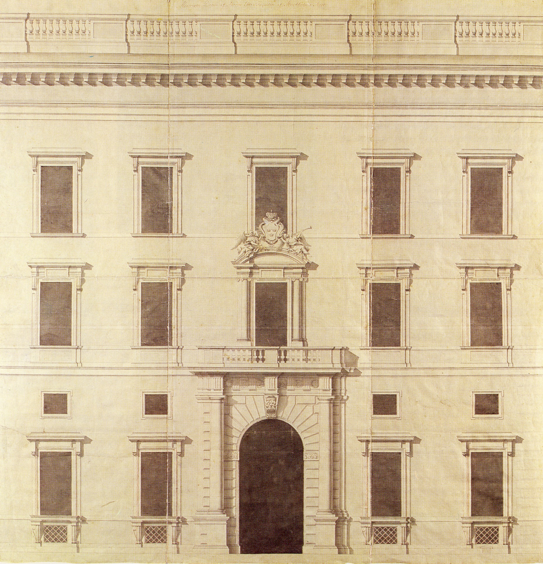 Kungliga slottet i Stockholm, Tessins ritning av norra fasaden (del)